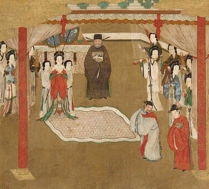 Anonymer professioneller Maler, Drei Blätter eines Albums, Tusche und Farben auf Papier, je 26 x 28,5 cm, Ming-Dynastie, spätes 16. bis frühes 17. Jh., Museum für Ostasiatische Kunst Köln, Inv. Nr. A 62